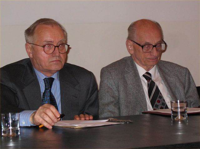 Władysław Bartoszewski (Warsaw, 19.02.1922, - Warsaw, 24.4.2015), Polish historian, publicist, writer and diplomat and Stefan Frankiewicz (b. 1940), Polish publicist, journalist and diplomat